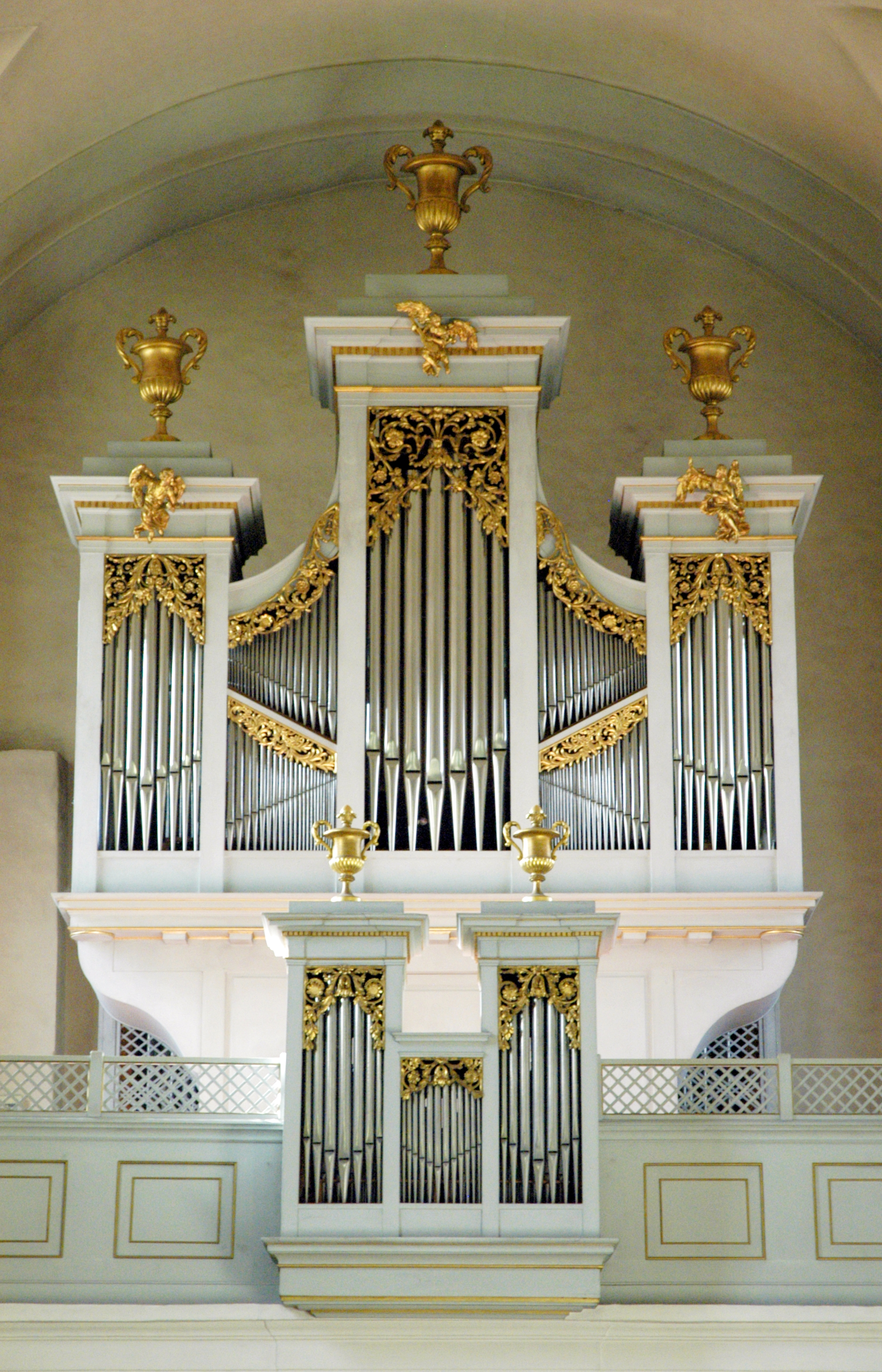 katholische Pfarrkirche heiliger Ulrich - Orgel